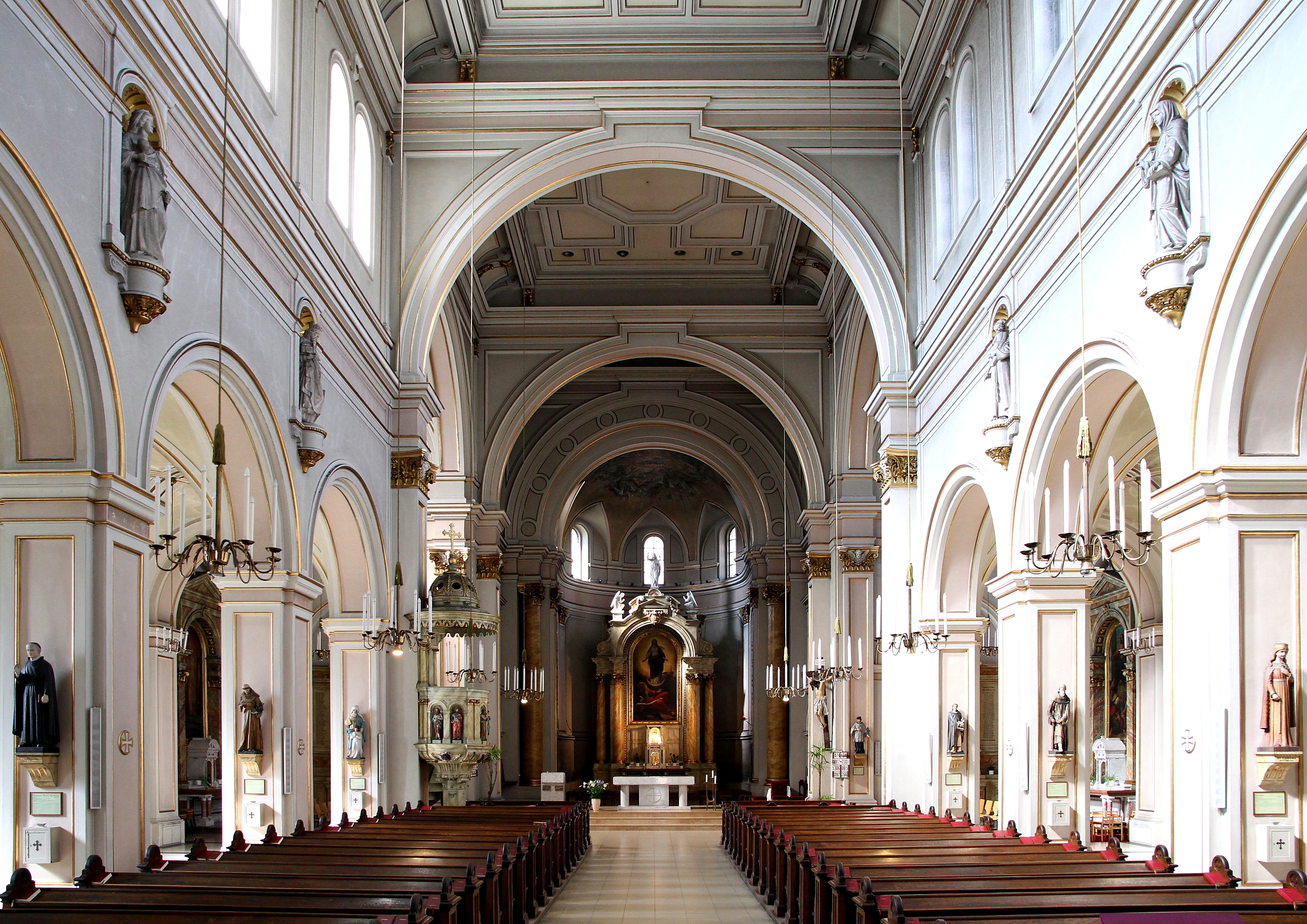 Die Innenansicht der katholischen Pfarrkirche hl. Johann Evangelist am Keplerplatz in Wien.